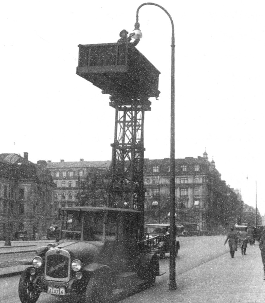 Gatlykta i Stockholm formgiven av arkitekt Gustaf de Frumerie